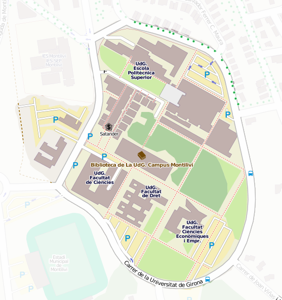 Campus de Montilivi de la Universitat de Girona This map may be incomplete, and may contain errors. Don't rely solely on it for navigation.